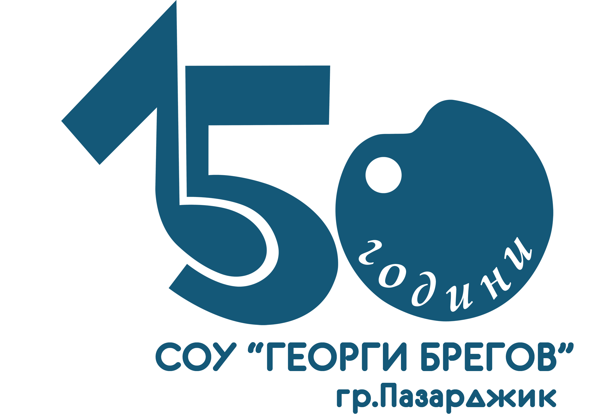 Юбилейно лого, 2014 г. Автор: Марин Кузев